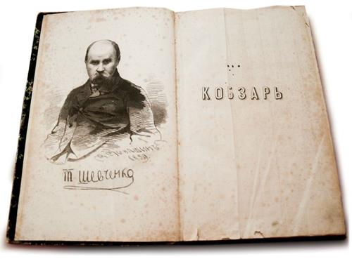 Кобзарь в Музеї НБ ОНУ